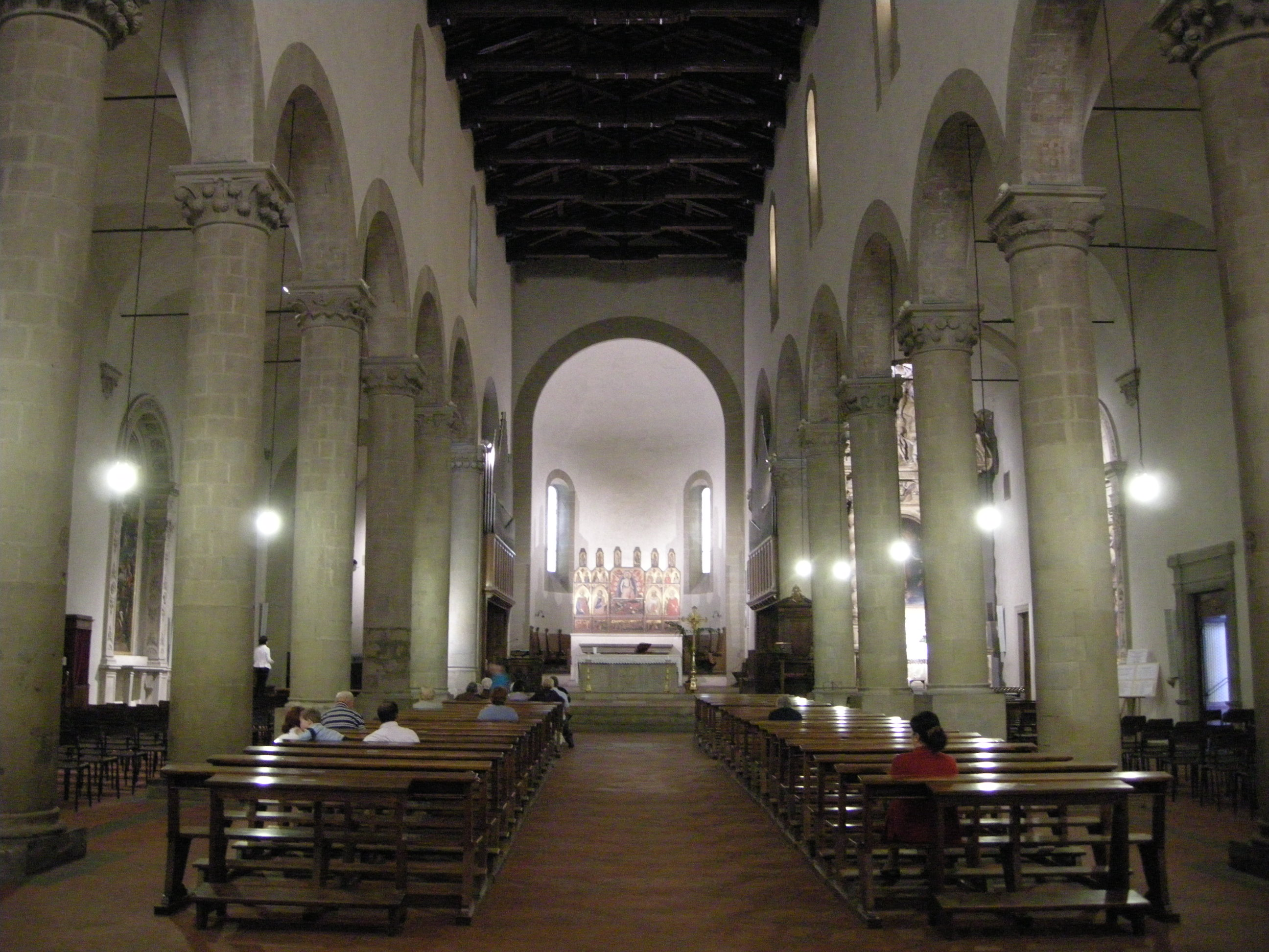 Duomo di sansepolcro, interno